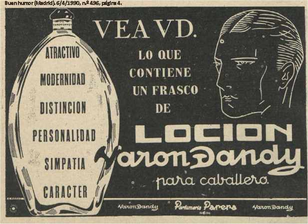 Locion varon dandy para caballeros